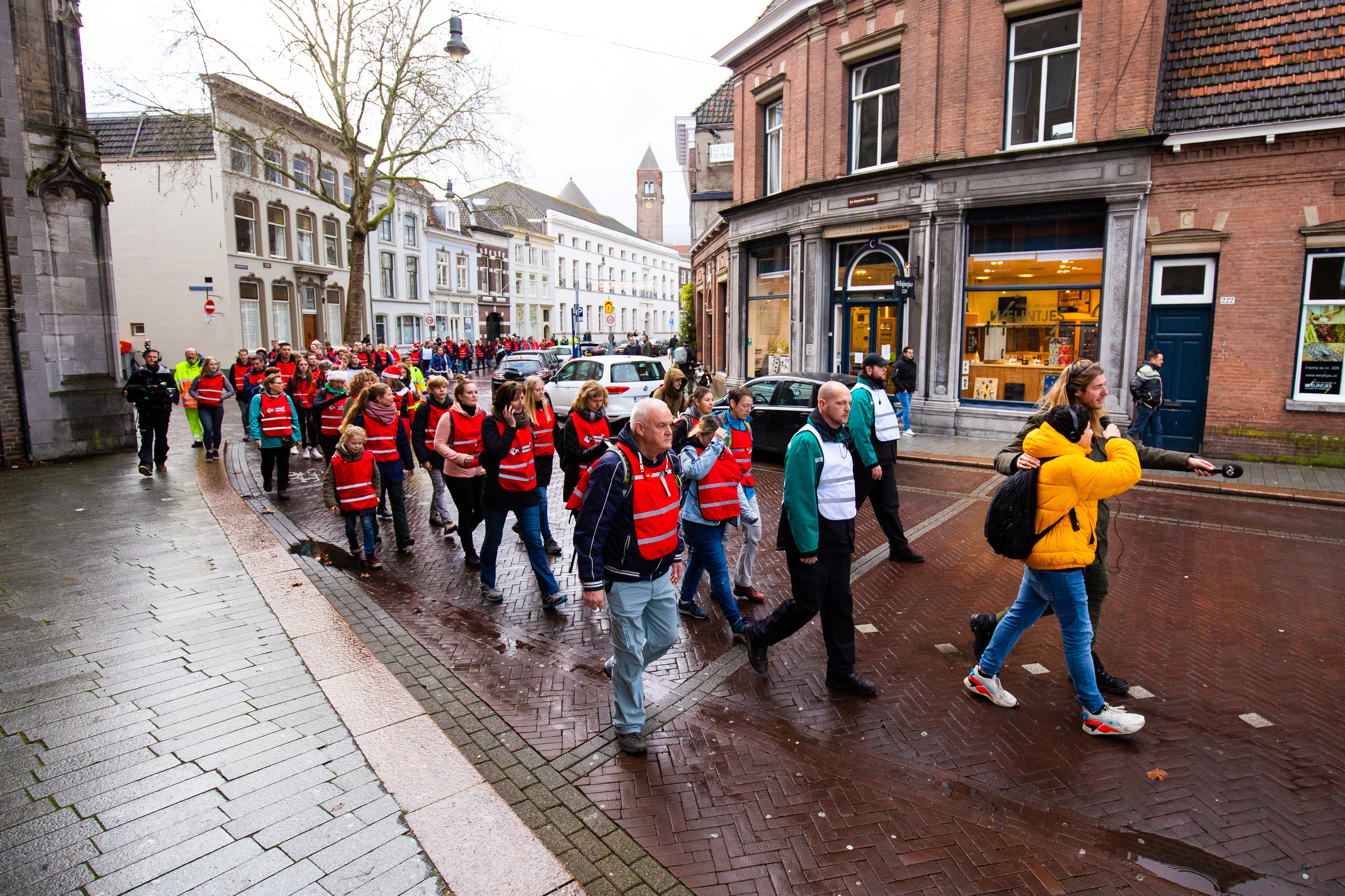 Wandelstoet van Serious Request 2019 in Den Bosch